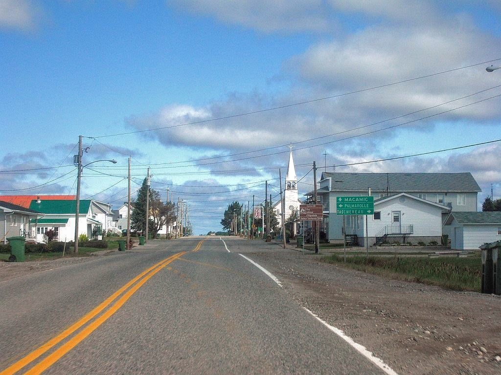 Vue sur le centre du village de Poularies, en Abitibi, à partir de la route 101 direction nord.